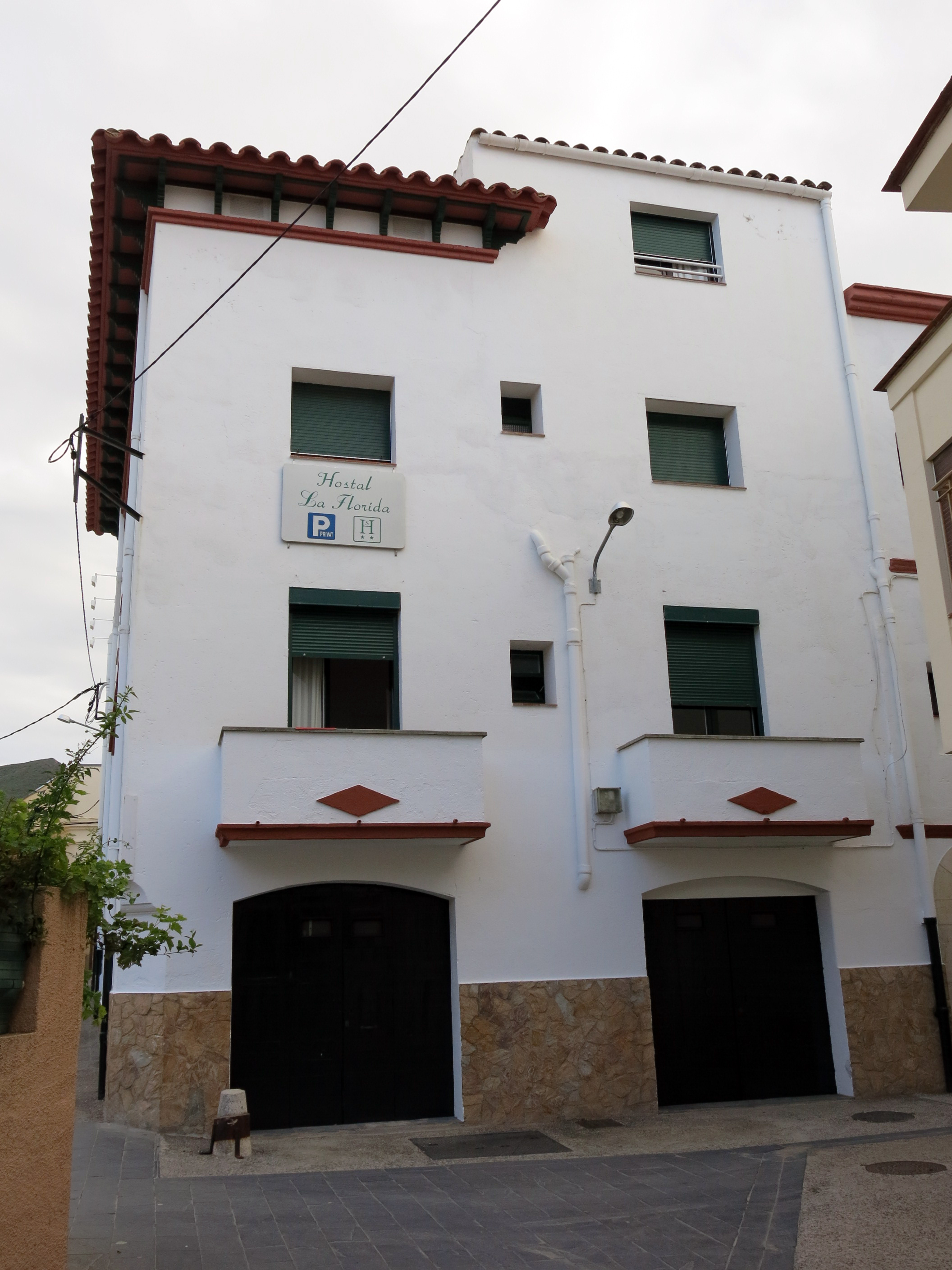 Hostal la Florida (Llançà)